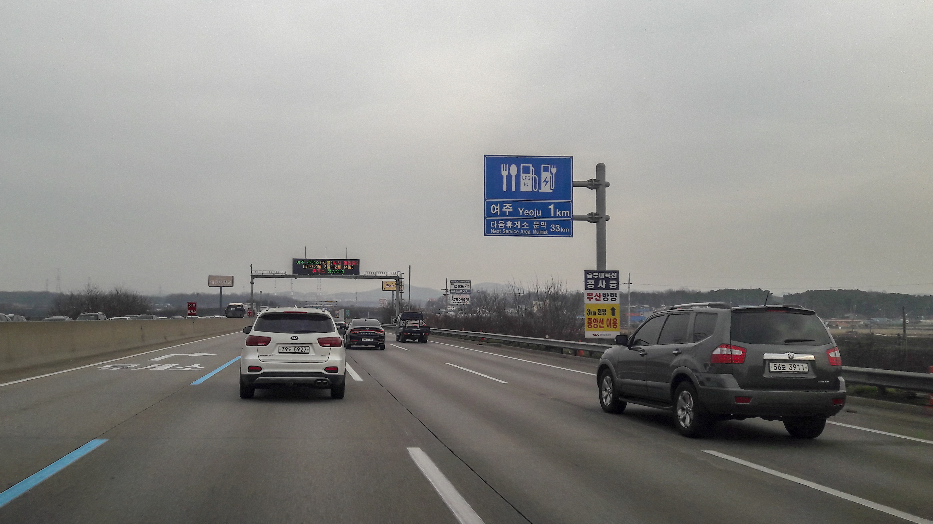 영동고속도로 여주휴게소 원주 방면 1km 표지판